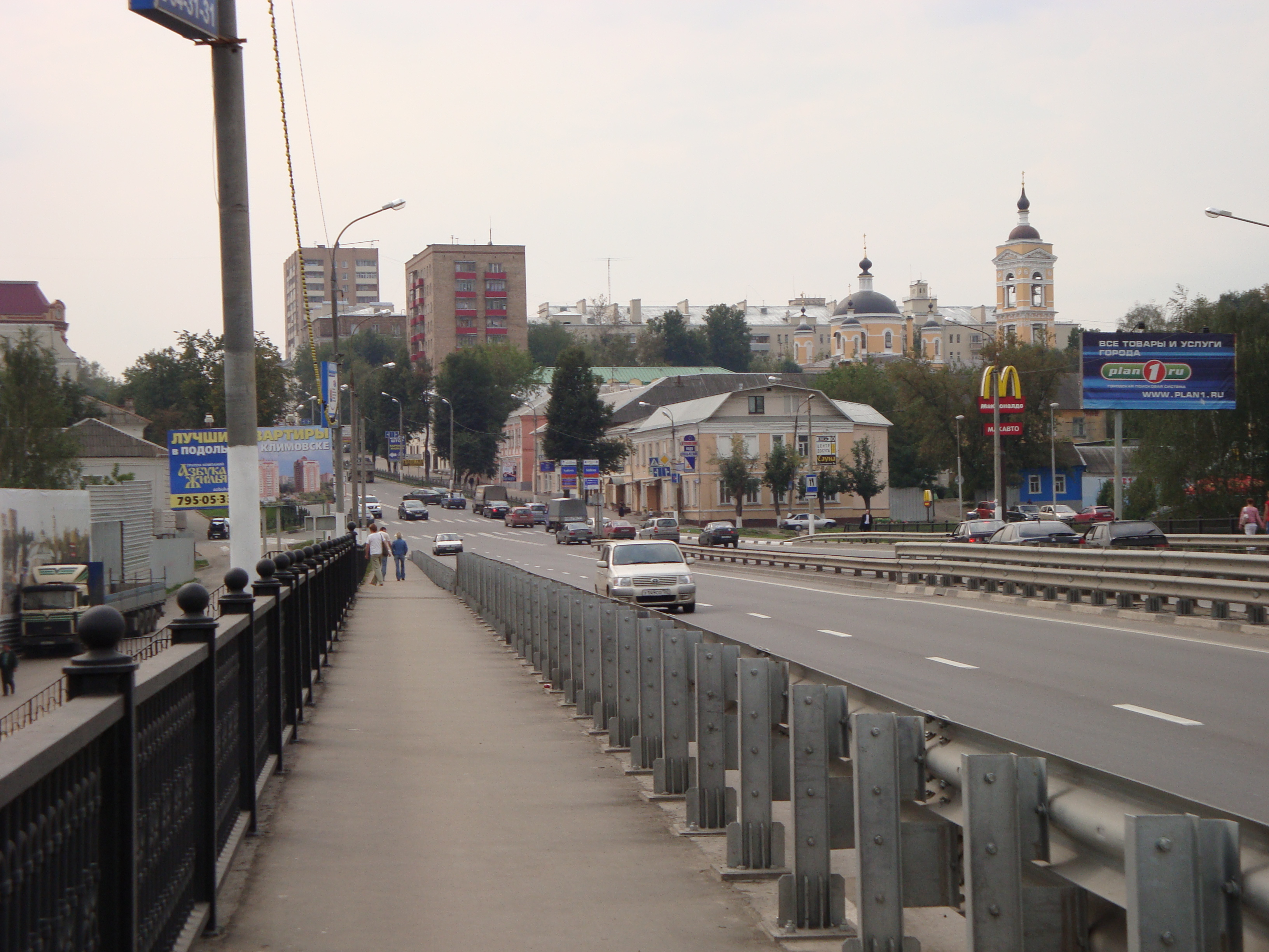 Вид на проспект Ленина с моста через реку Пахру в Подольске (Московская область)